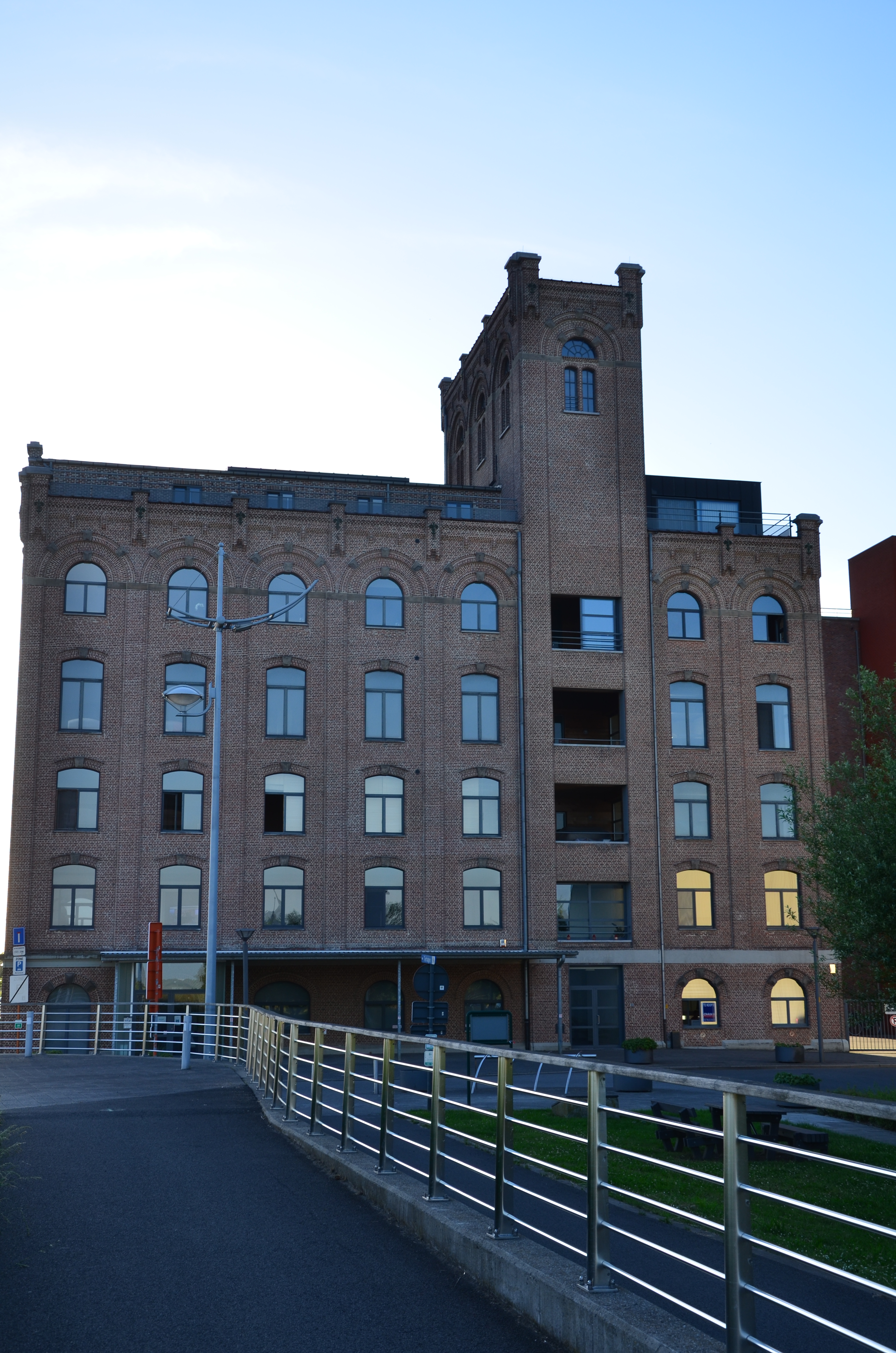 Voormalige Bloemmolens Rypens, nu wooncomplex, Bassinstraat 12, Boom